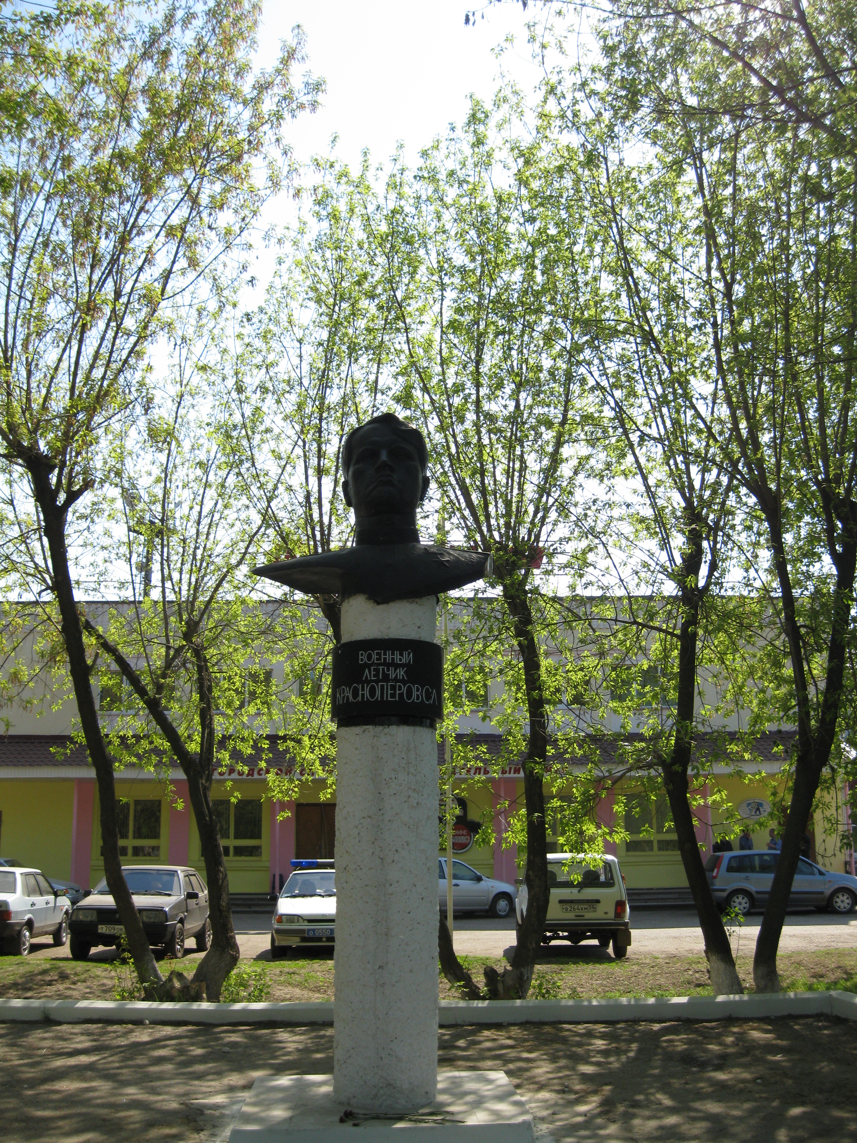 Памятник Сергею Леонидовичу Краснопёрову. Открыт 10 июня 1984 года в городе Чернушка на ул.Ленина перед клубом "Энтузиаст".(Автор памятника – пермский скульптор А. Уральский).